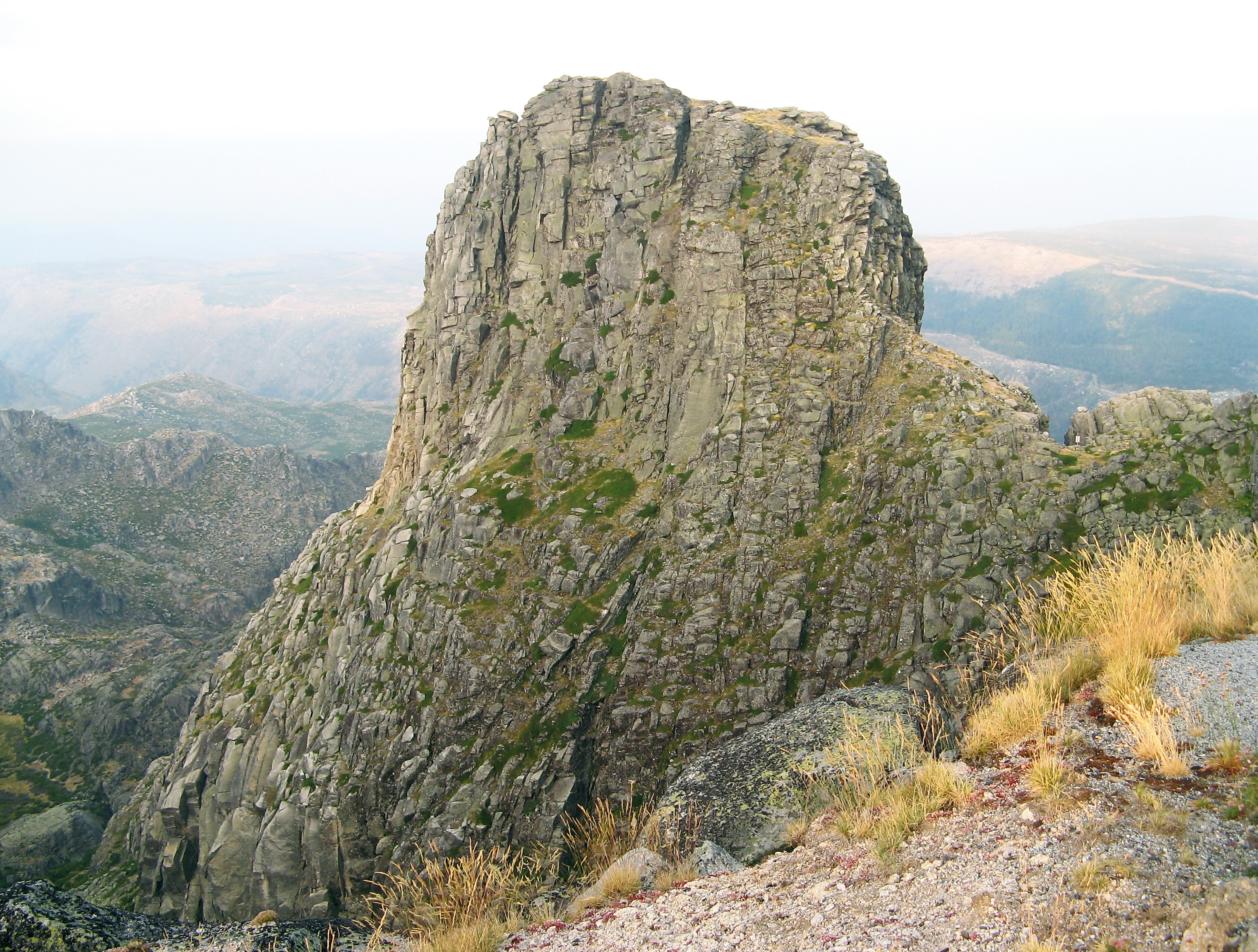 Cântaro Magro. Nunatak e filão dolerítico com topo a 1928m de altitude. Serra da Estrela, Portugal.